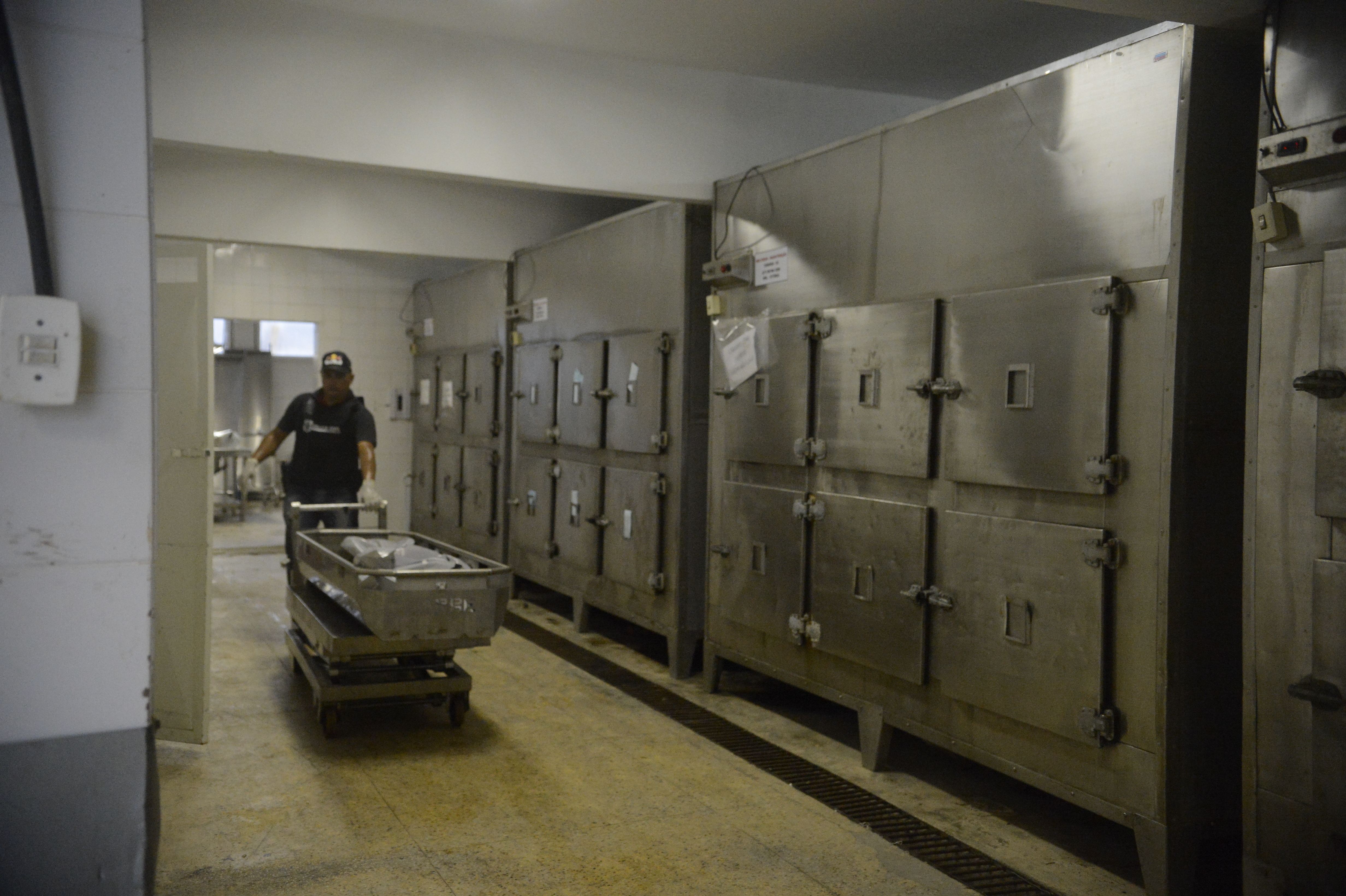 Vitória (ES) - Corpos chegam ao departamento médico legal de Vitória que chegou a ser fechado (Tânia Rêgo/Agência Brasil)